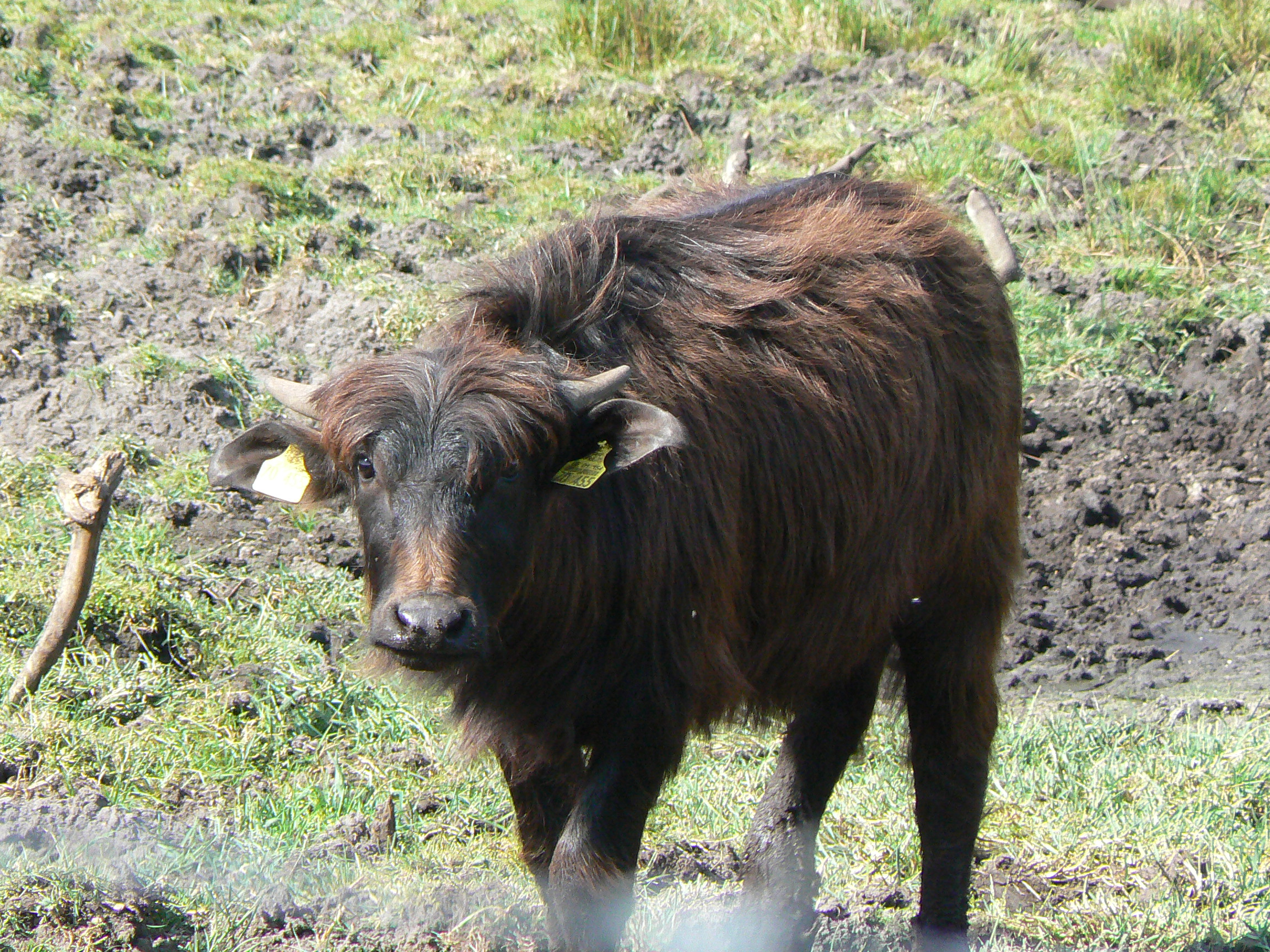 Der Europäische Hauswasserbüffel ist gedrungen, die Beine sind recht kurz. Er ist schiefergrau bis schwarz. Im Gegensatz zu anderen Rindern, deren Hörner einen runden bis ovalen Querschnitt haben, ist der Querschnitt bei den Wasserbüffeln dreieckig. Büffelmilch hat mit 7-8 % doppelt so viel Fett wie Kuhmilch, sie wird hauptsächlich zu Käse verarbeitet (Mozzarella in Italien). Büffelfleisch hat verglichen mit Rinderfleisch 40 % weniger Cholesterin